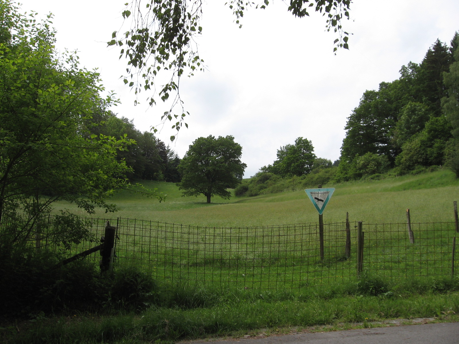 Nördlicher Teil des Naturschutzgebietes „Faules Siepen“ südlich von Meschede-Wehrstapel.